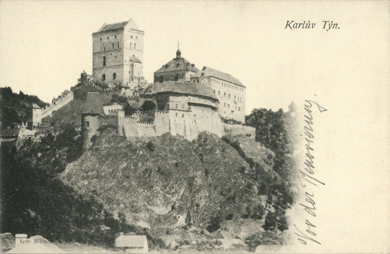 Karlův Týn (Vor der Renovierung)